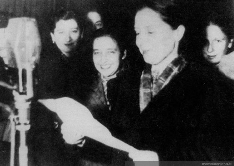 Elena Caffarena haciendo campaña radial del Memch, 1938.